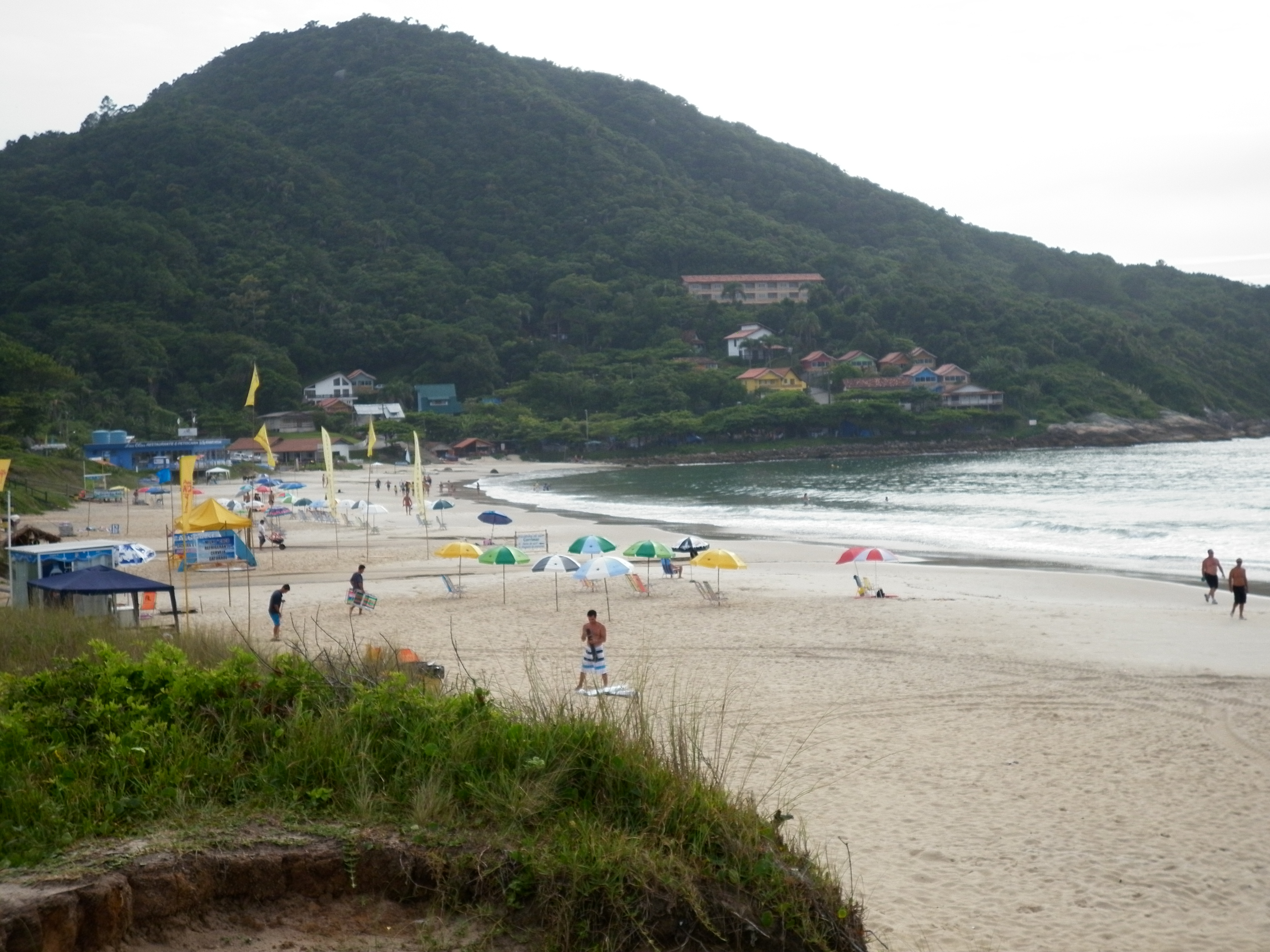 Praia 4 Islas